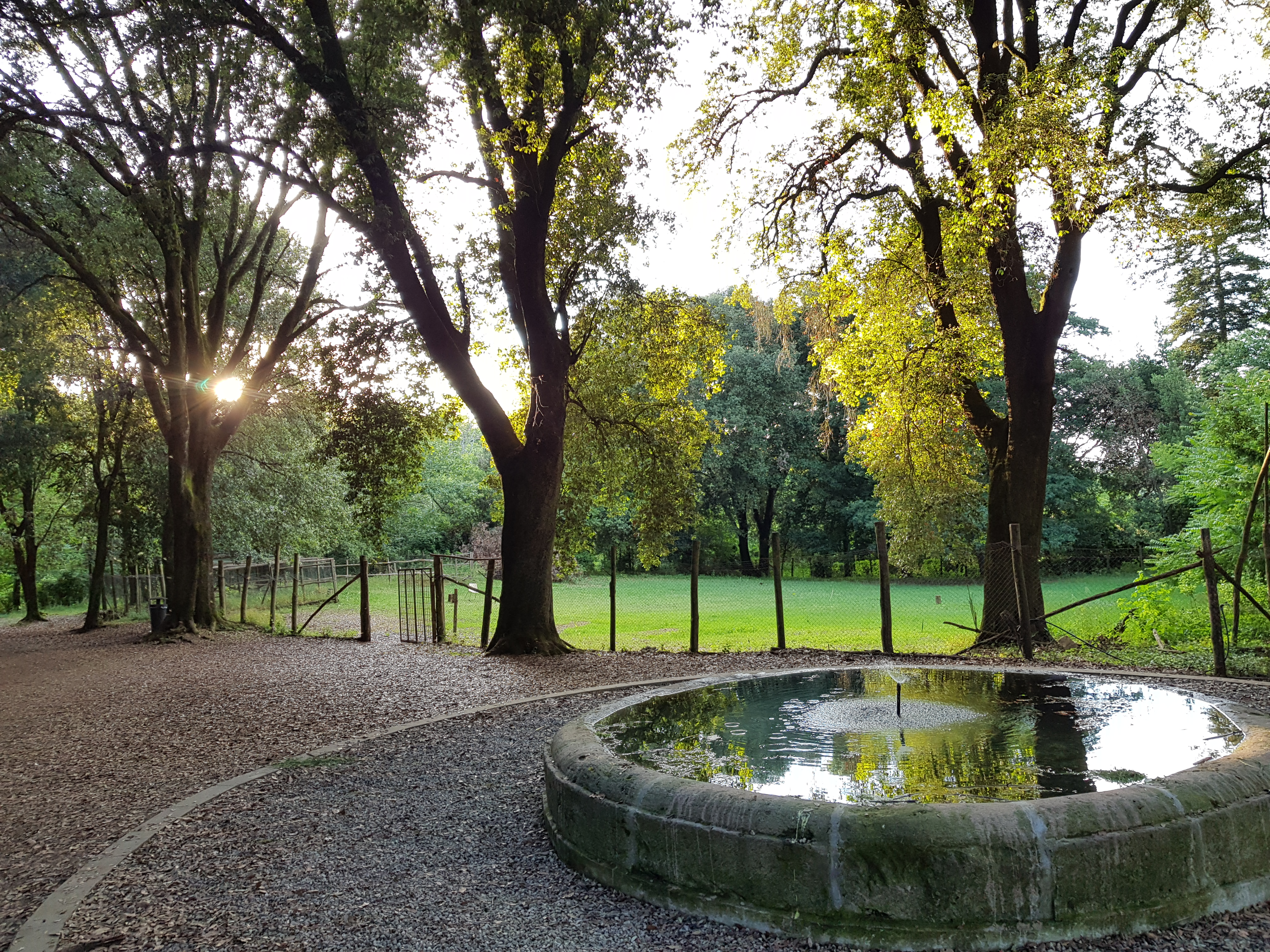 Oriolo Romano, Palazzo Altieri: la fontana al centro del giardino.